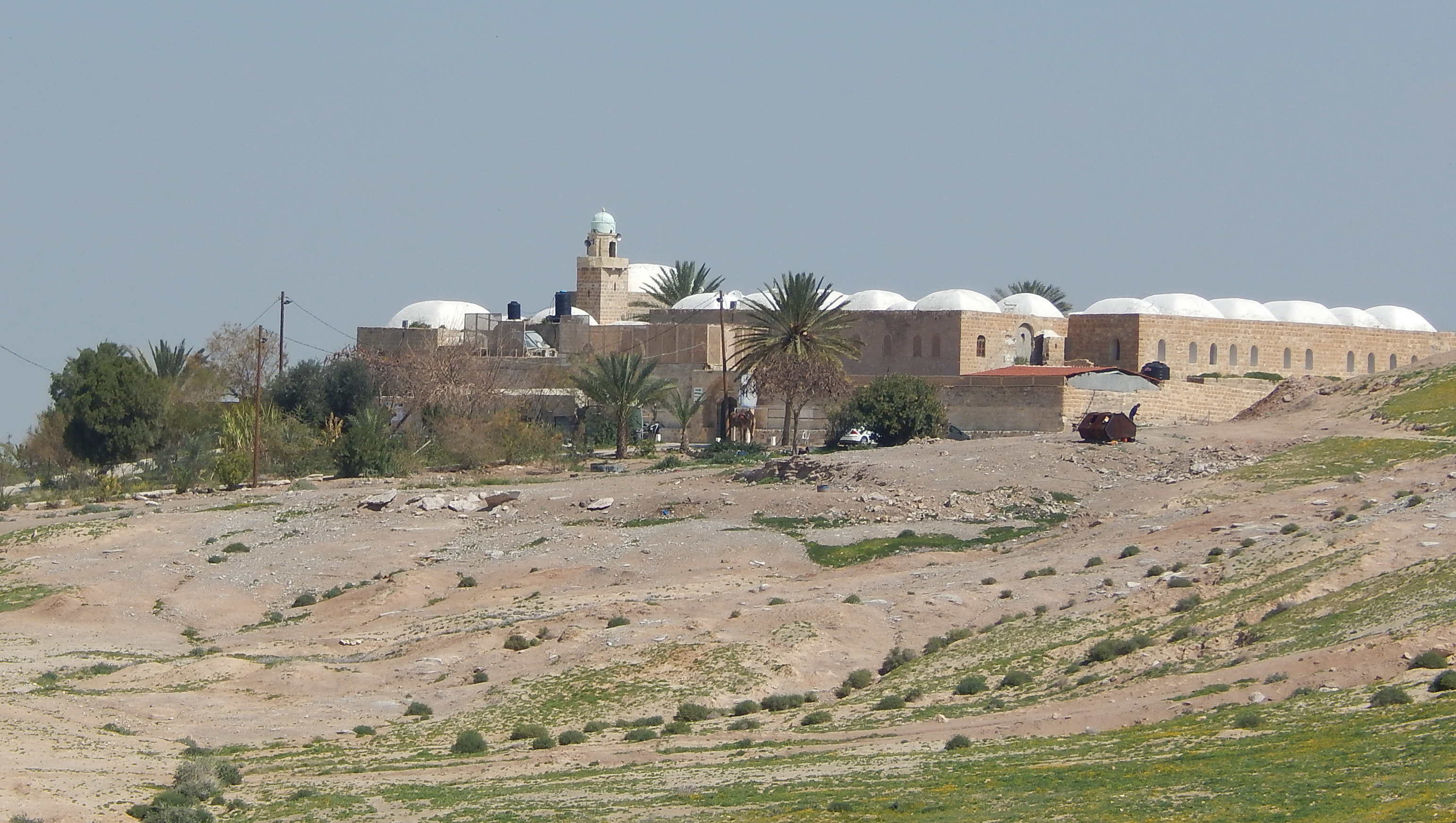 Наби Муса (гробница Моисея)